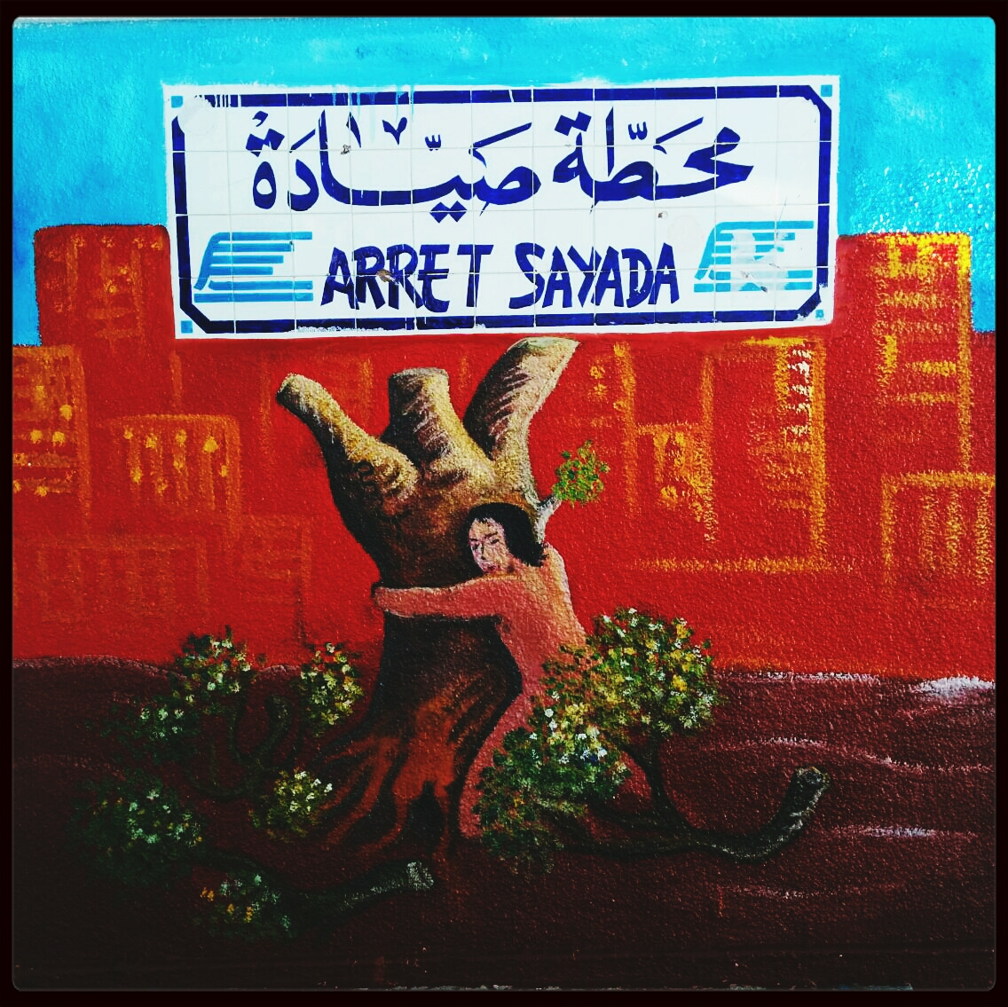 Peinture dans la gare de Sayada.